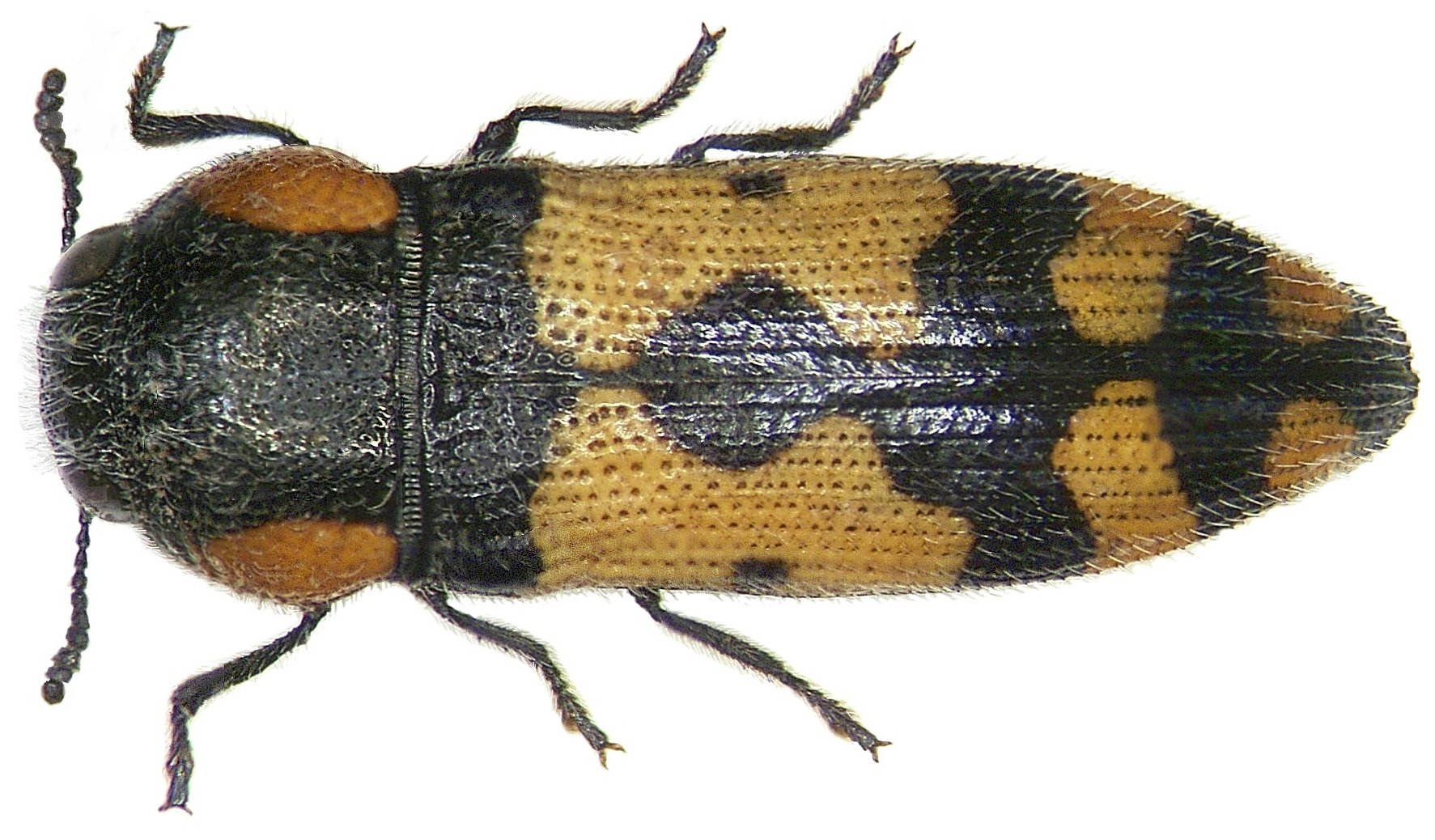 Familie: Buprestidae Grösse: 8 mm Fundort: Namibia, Brandberg leg. U.Schmidt, 1994; det. Mühle Foto: U.Schmidt, 2006